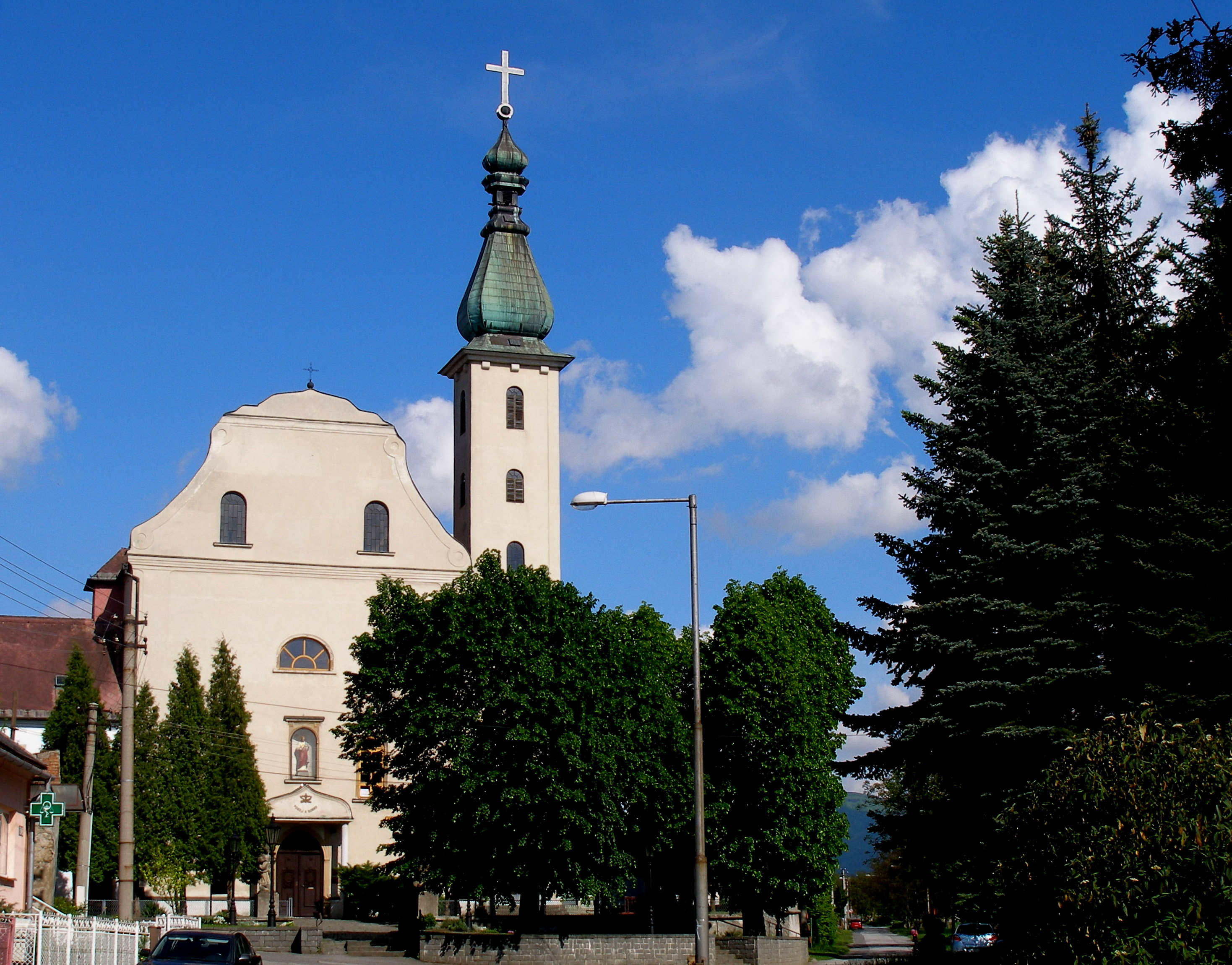 Nižná Šebastová miestna časť mesta Prešov.Kostol Najsvätejšieho Mena Ježiš a Mária.